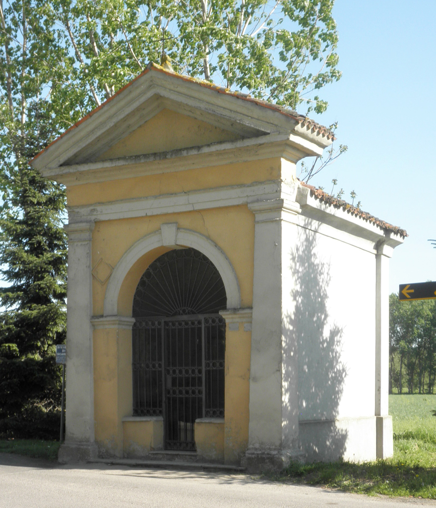 Oratorio di San Rocco a Bertonico.